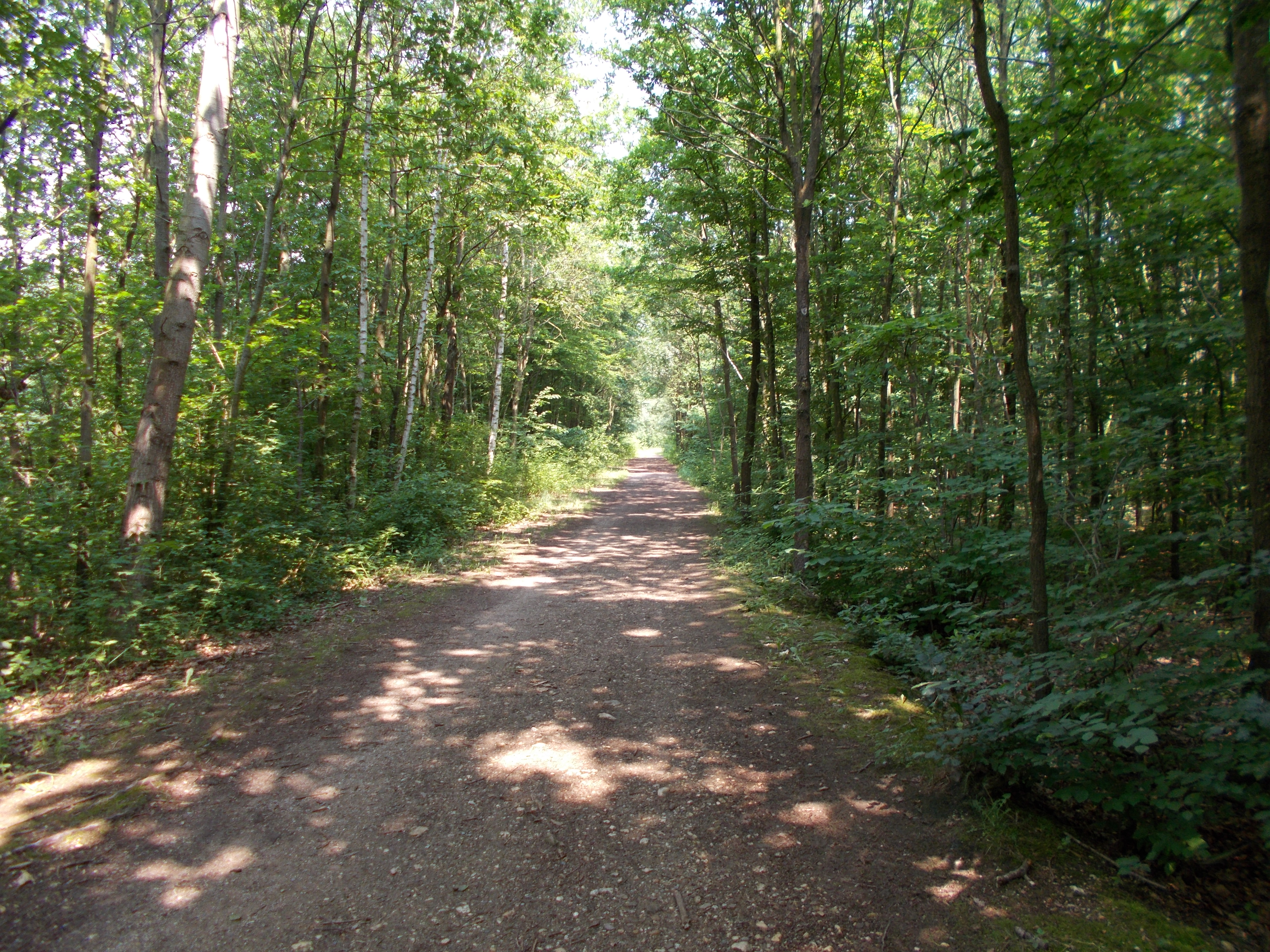 Waldweg entlang der Kasterer Mühlenerft / Kasterer See